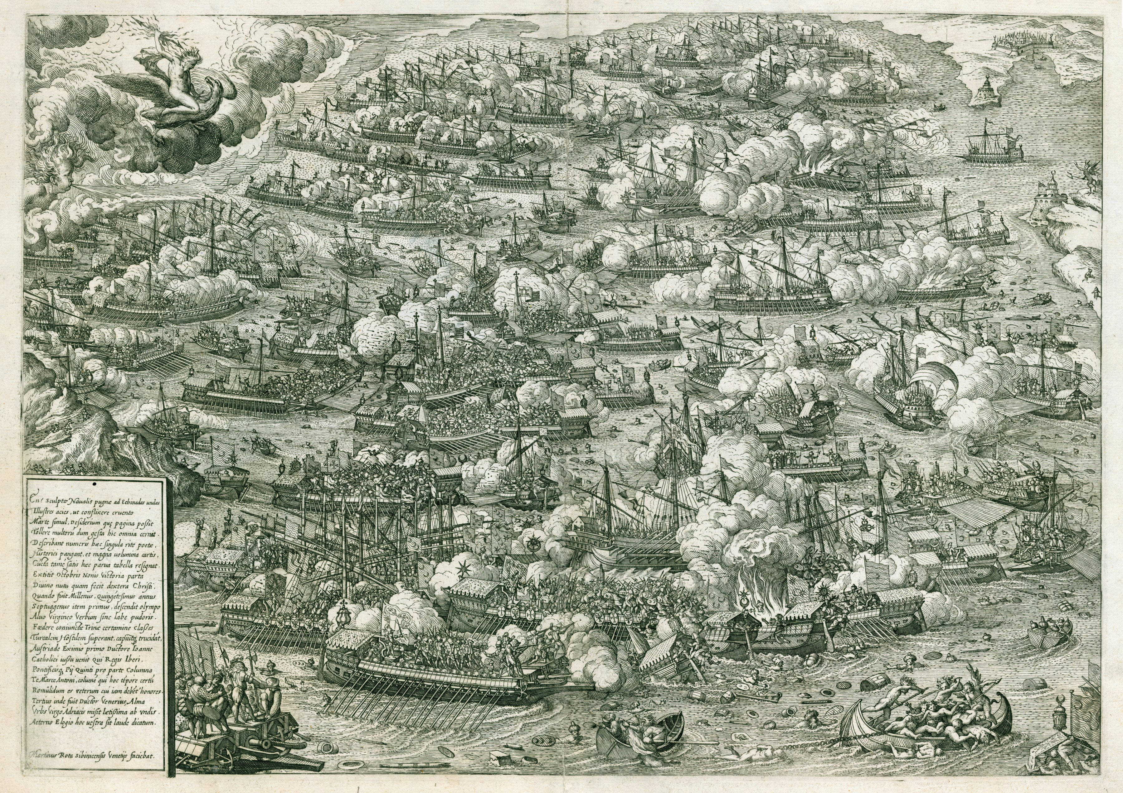 The Battle of Lepanto, engraving by Martin Rota [309 x 469 mm]: "Navalis Victoriae exemplar, qua Nonis Octobris ad scopulos Echinadum in Jonio. no longe ab oppido Naupacto. Anno ab Incarnatione Dominica. MDLXXI. Christiani in Turcas positi sunt Ducibus Siimis Princibus Marco Antonio Columna Romano, Ioanne Austriaco Caroli Quinti Imperatoris filio, et Sebastiano Venerio Nobili Veneto. Nunc sane eo maiori studio effictum, quo a multis, qui in ca pugna fuerunt, aptior universe illius Classis ordo & modus acceptus est quam antea quos effingere iterum non displicuit, ut nedum ubique locorum tanta Victoria Omnimode celebrari possit ucrum et ante oculos expresis haberi - Martinus Rota Sibenicensis inventor Apud Donatum Bertellum. MDLXXII ad insigne Divi Marci Venetiss"